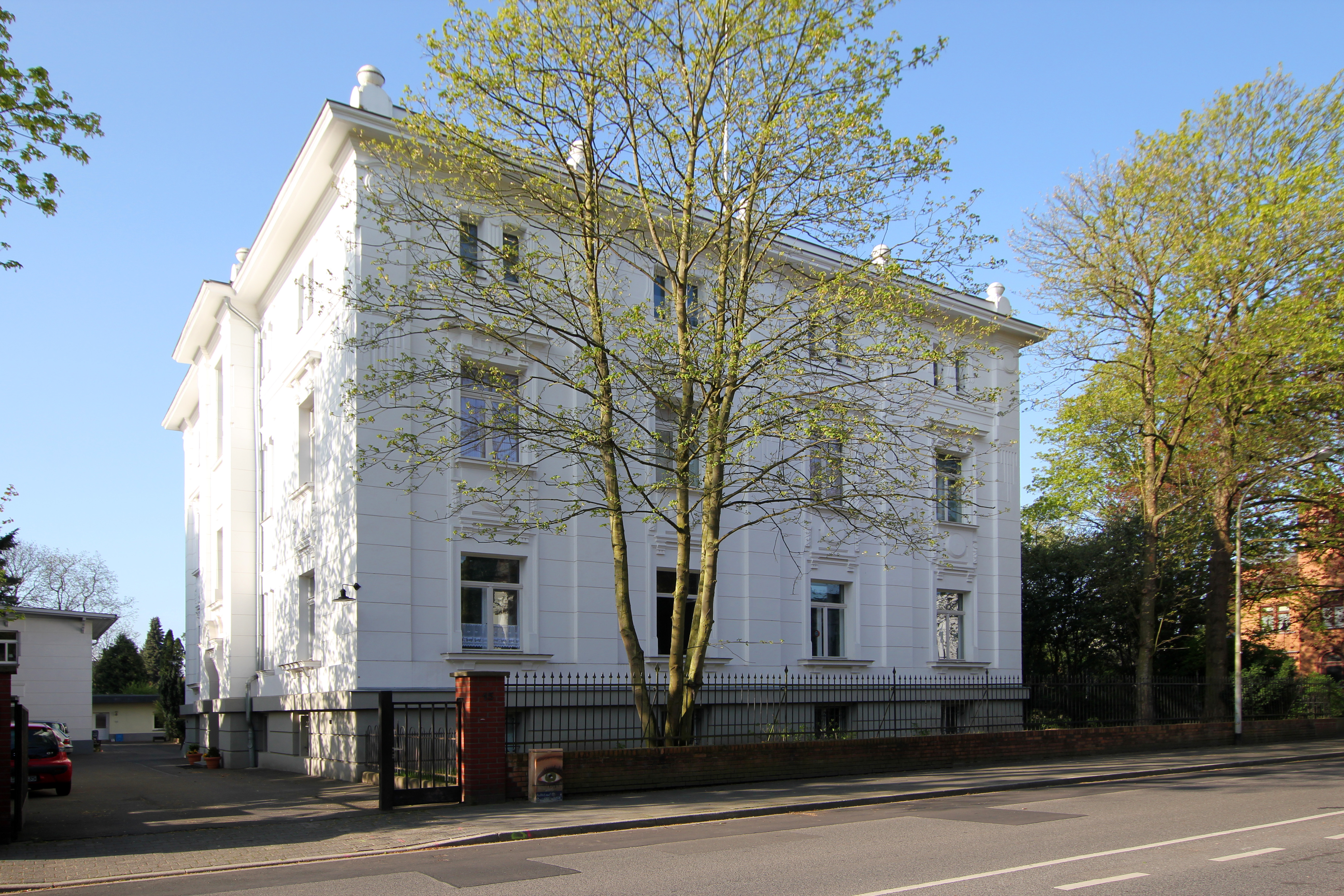 Brühl, Kaiserstraße 15, Villa Gruhl. 1899 entworfen im frühen Jugendstil durch den Leipziger Architekten Georg Wünschmann